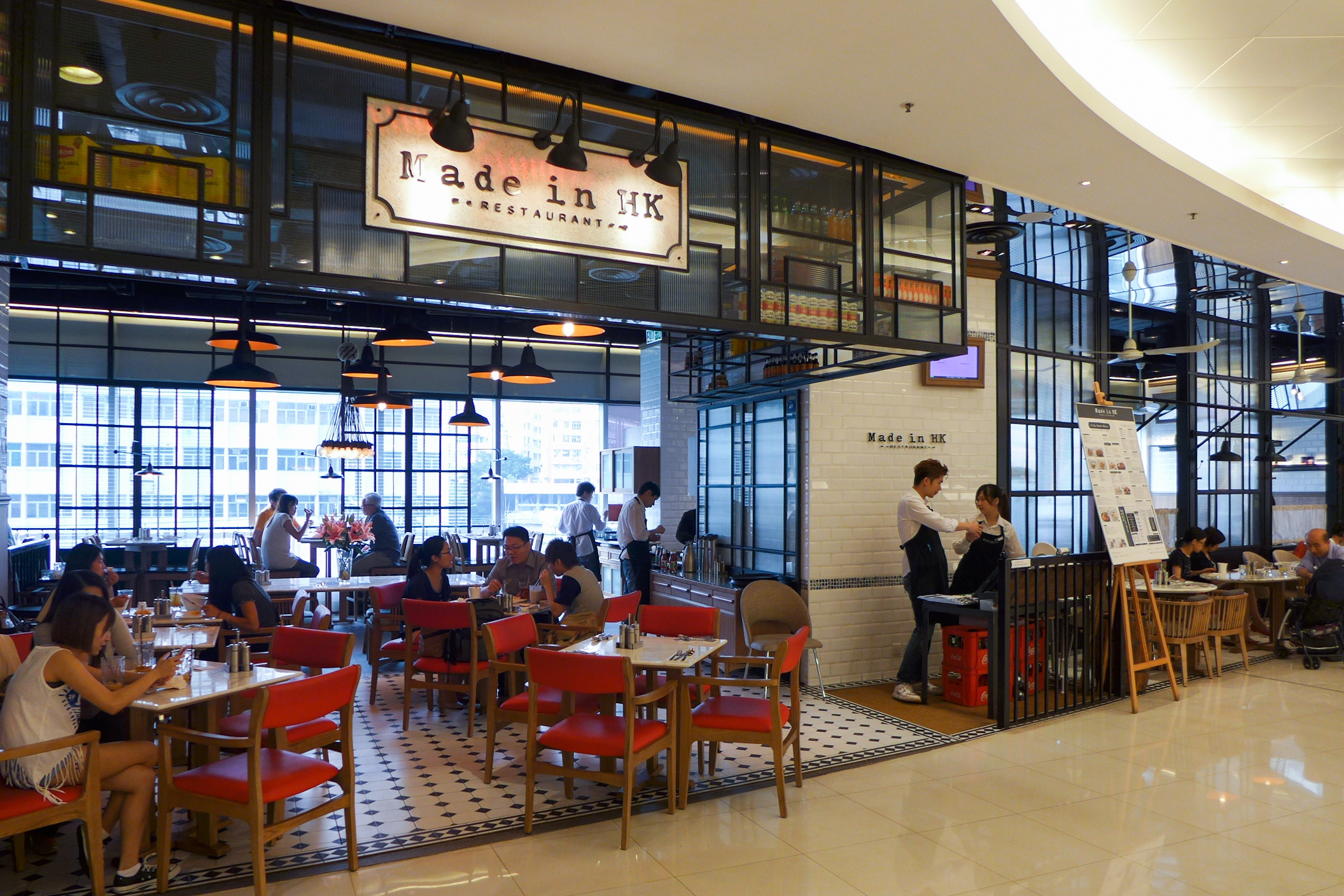 Made in HK apm